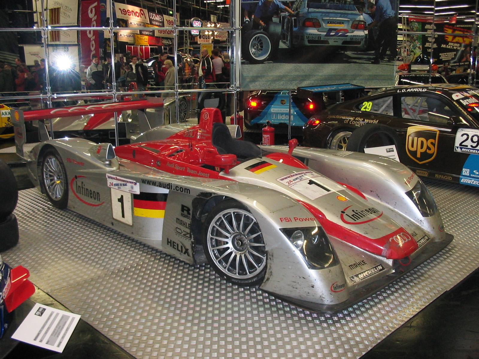 Audi R8 auf dem Auto Salon Nürnberg 2006